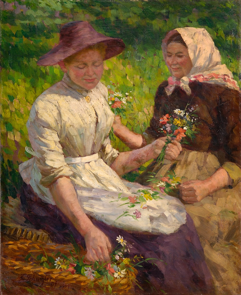 Frühlingsboten. Signiert. Datiert 1909. Öl auf Leinwand, 110 x 90 cm.